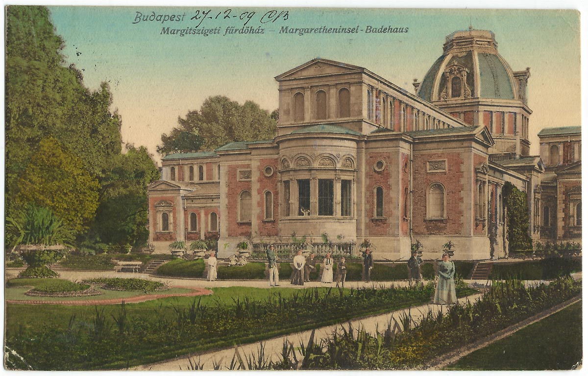 Vue de Budapest au début du XXe siècle.